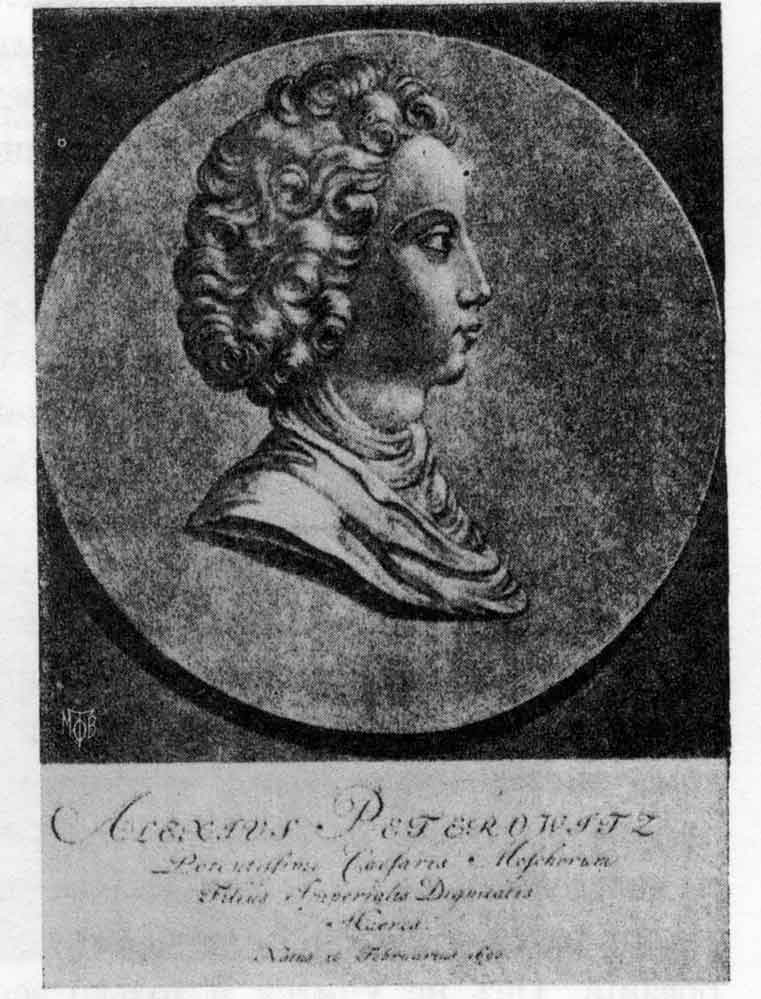 Царевич Алексей Петрович. Гравюра акватинта Гуена 1703 г